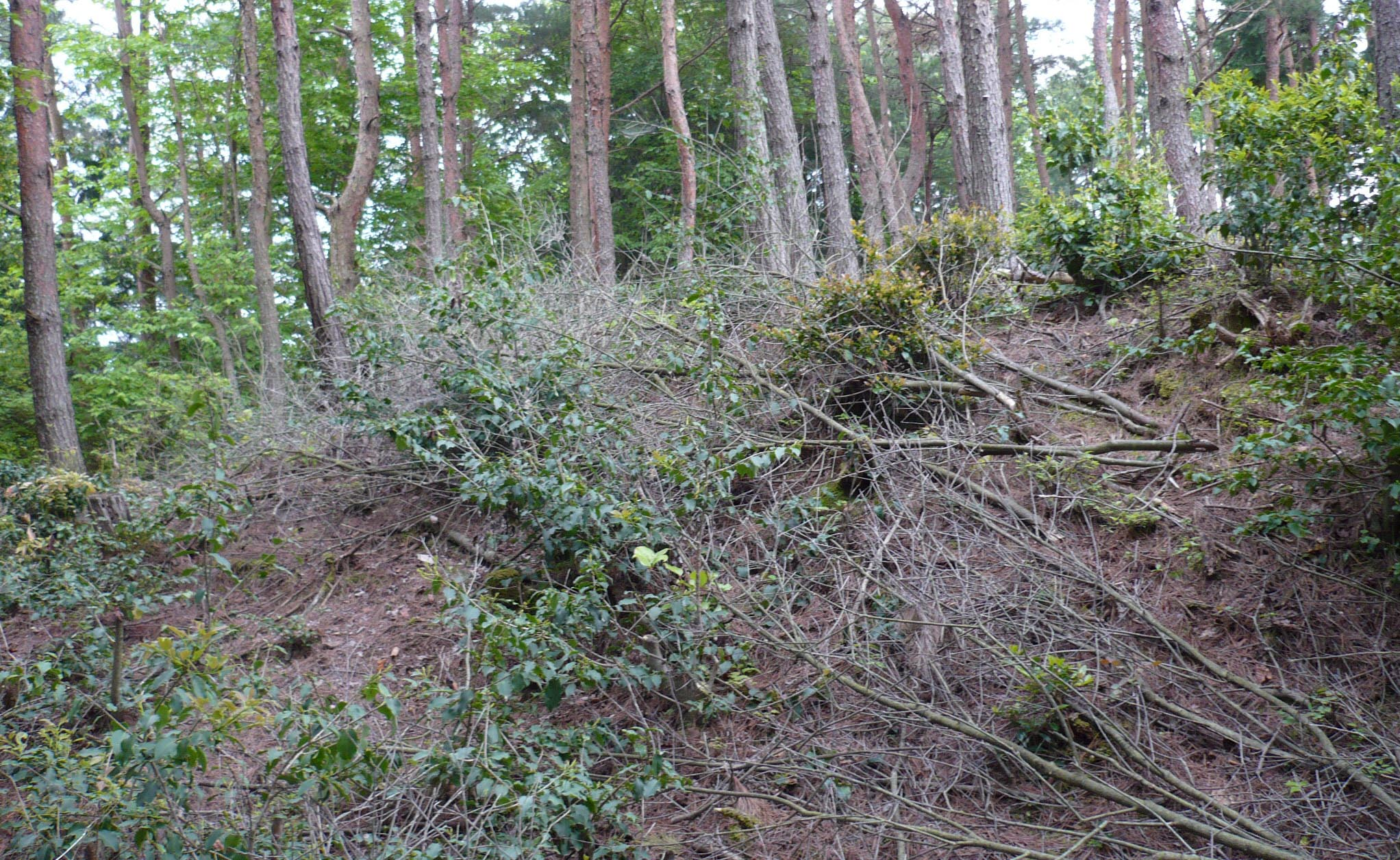 天守台跡